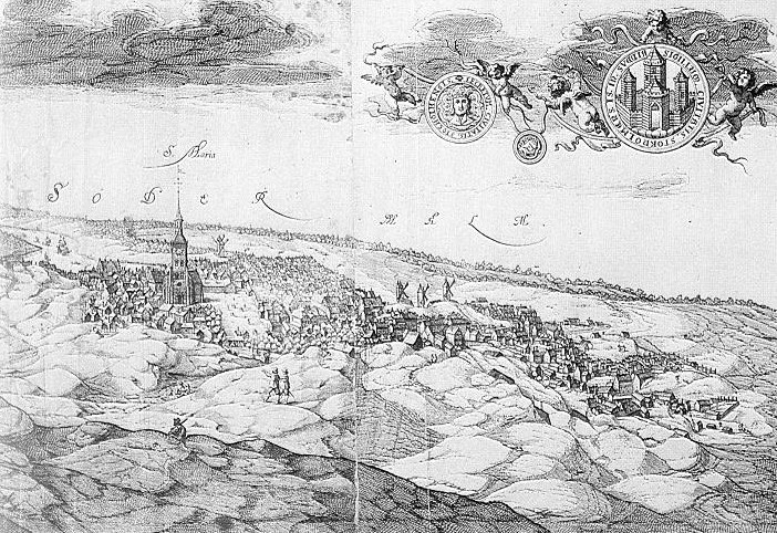 Sigismund von Vogel Stockholmspanorama från Skinnarviksberget 1647, del av Södermalm